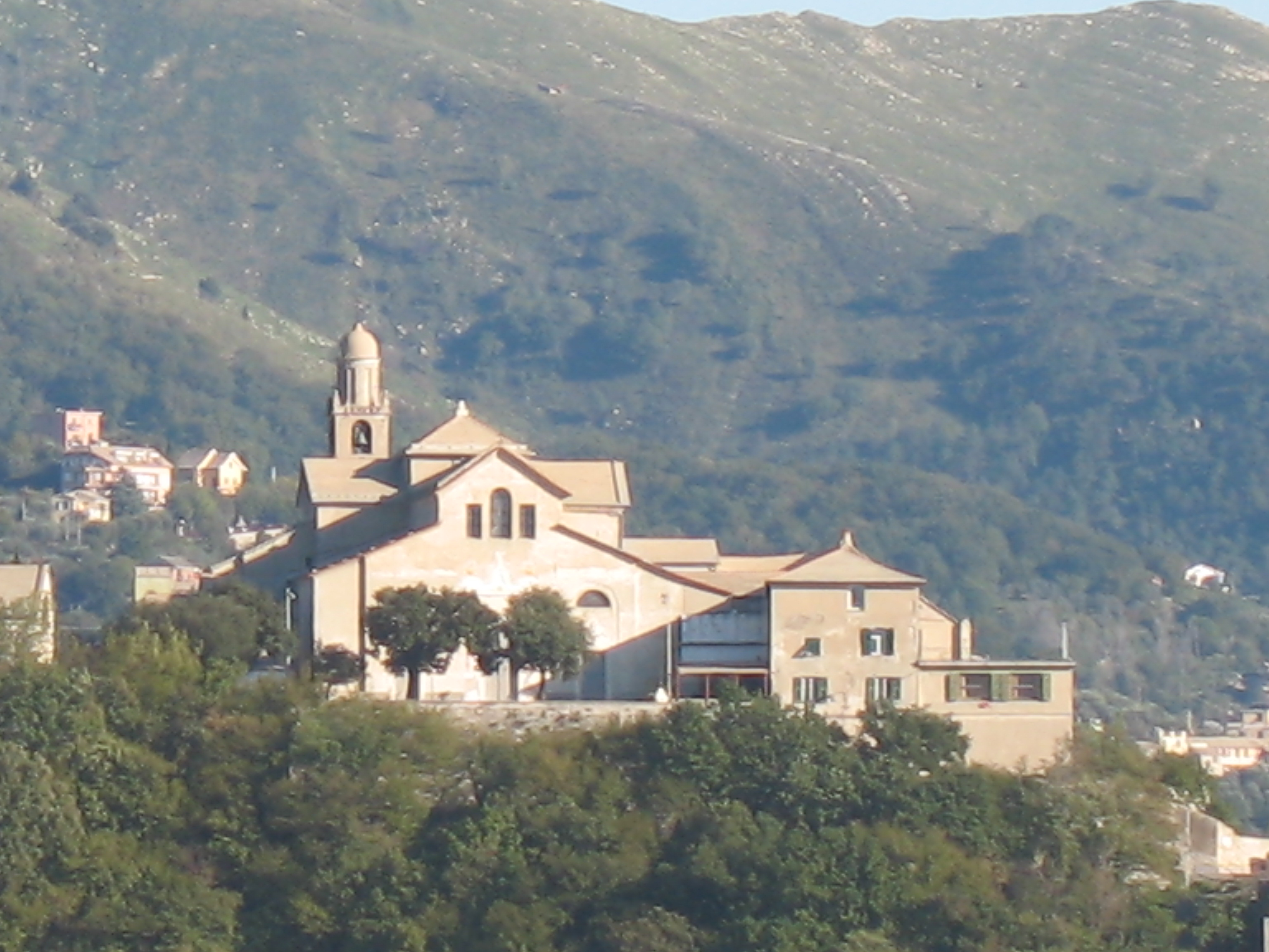 Immagine da Genova - Panorama da Castelletto: Santuario della Madonna del Monte